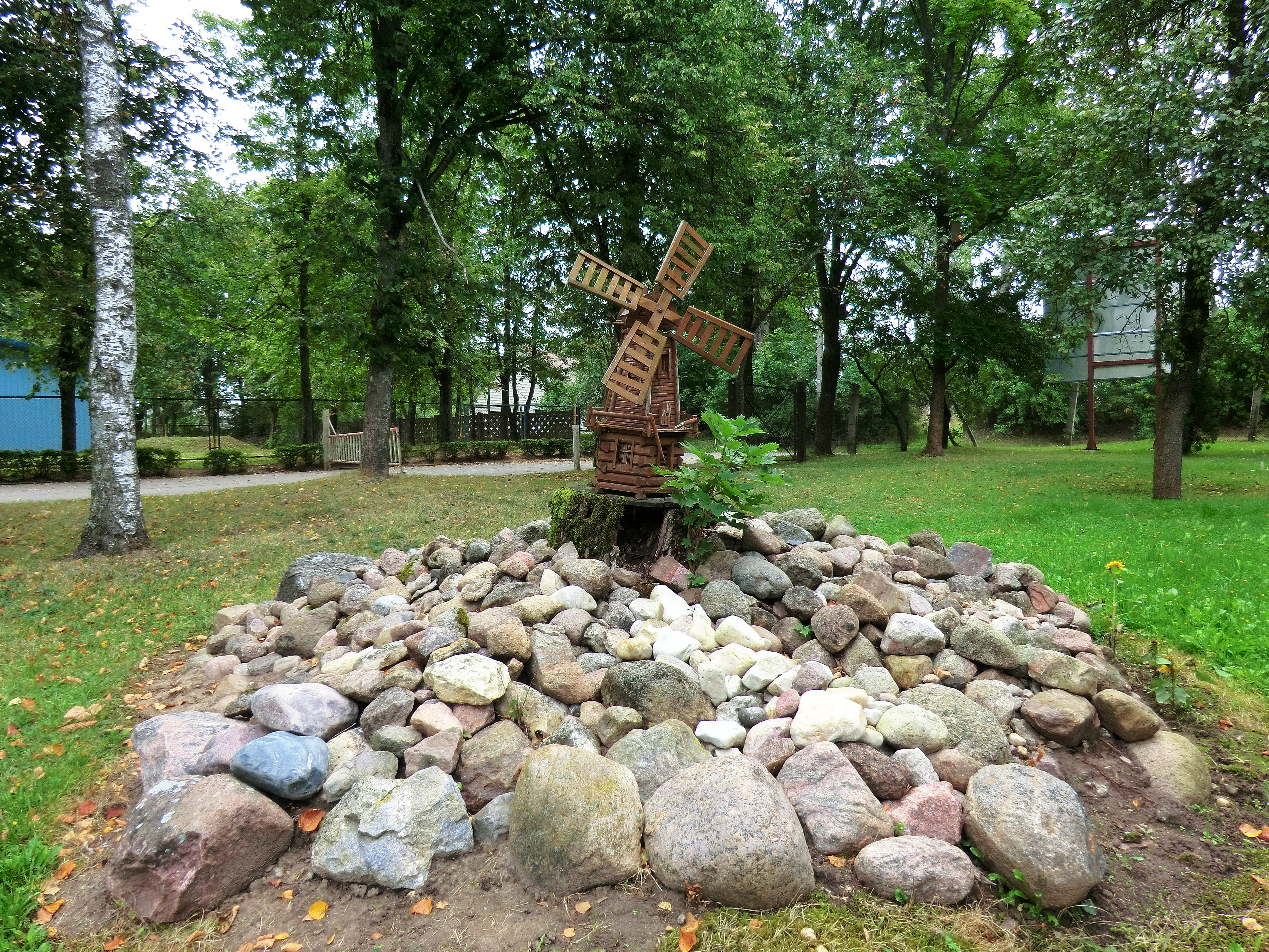 мини-мельница